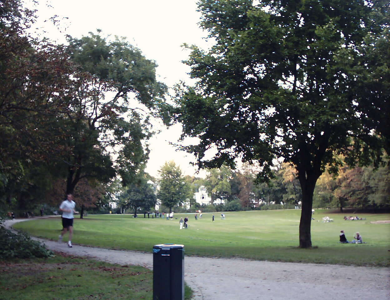 Bildbeschreibung: Innocentiapark, Hamburg-Harvestehude, Laufstrecke Datum: 21.9.2005